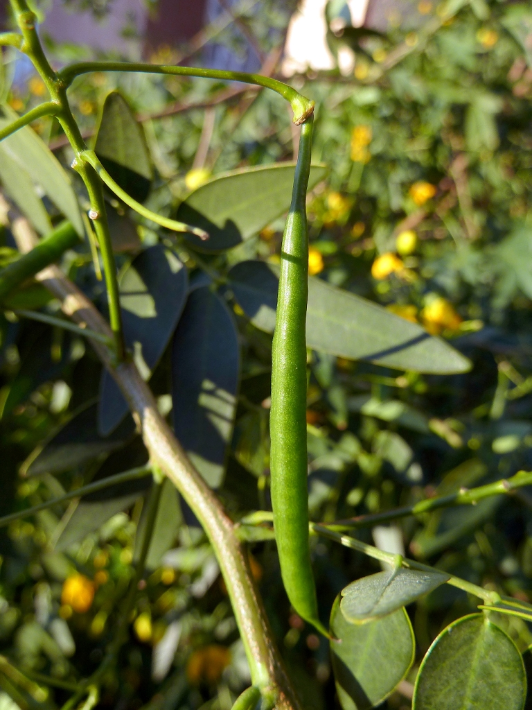 Senna corymbosa (Lmk.): fruto (legumbre) inmaduro - Águilas (Murcia).